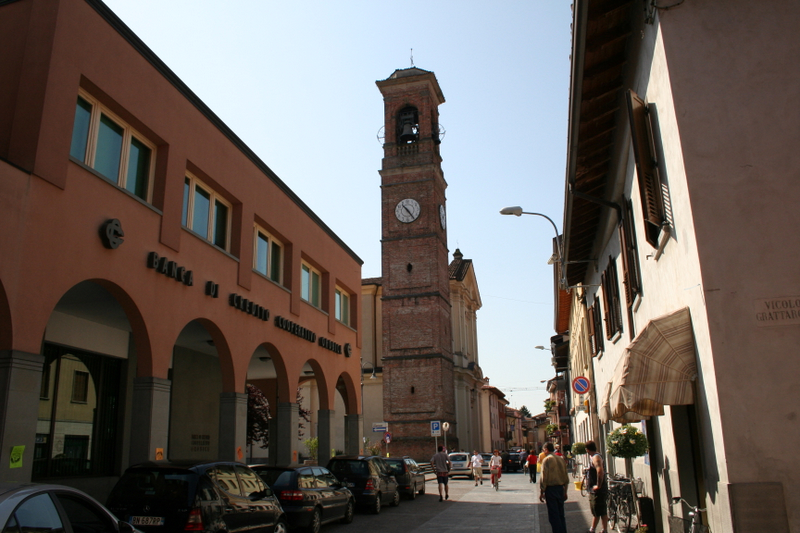 Bariano BG, vista